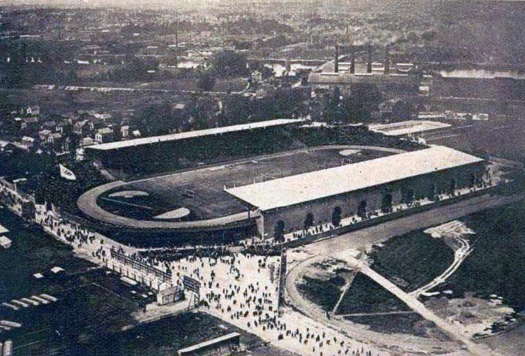 Le stade de Colombes le jour de la finale de football aux JO de 1924.